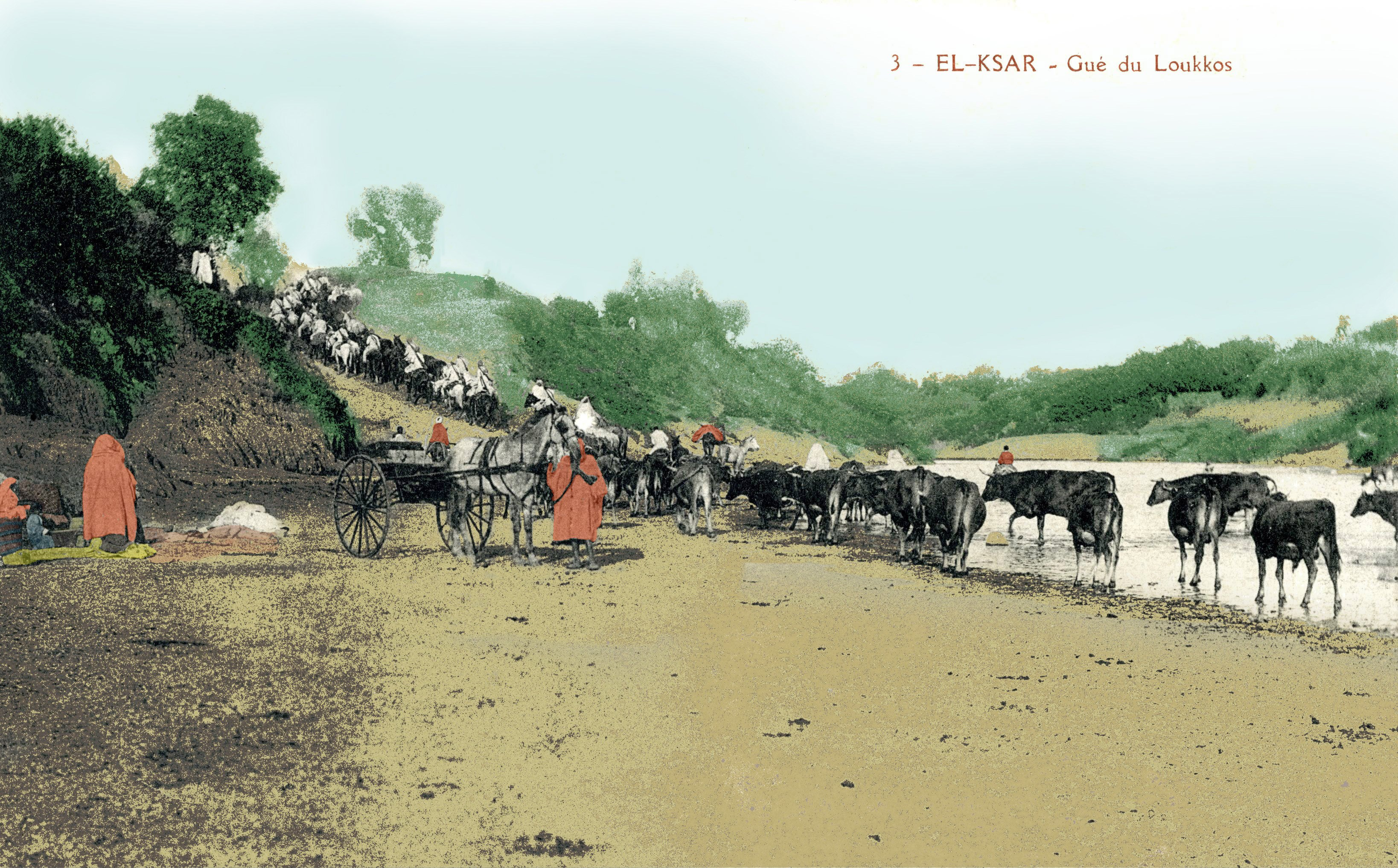 Carte postale ancienne, colorisée par moi, de l'oued Loukkos.